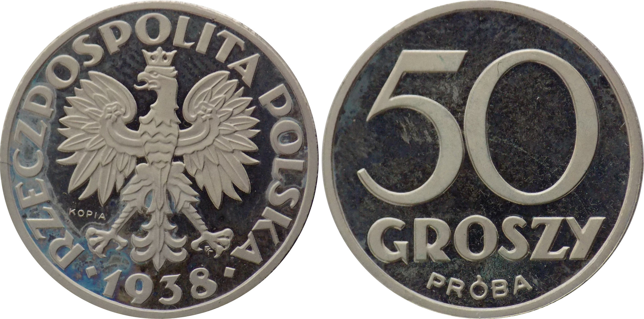 Replika próba 50 groszy 1938 duże cyfry 50